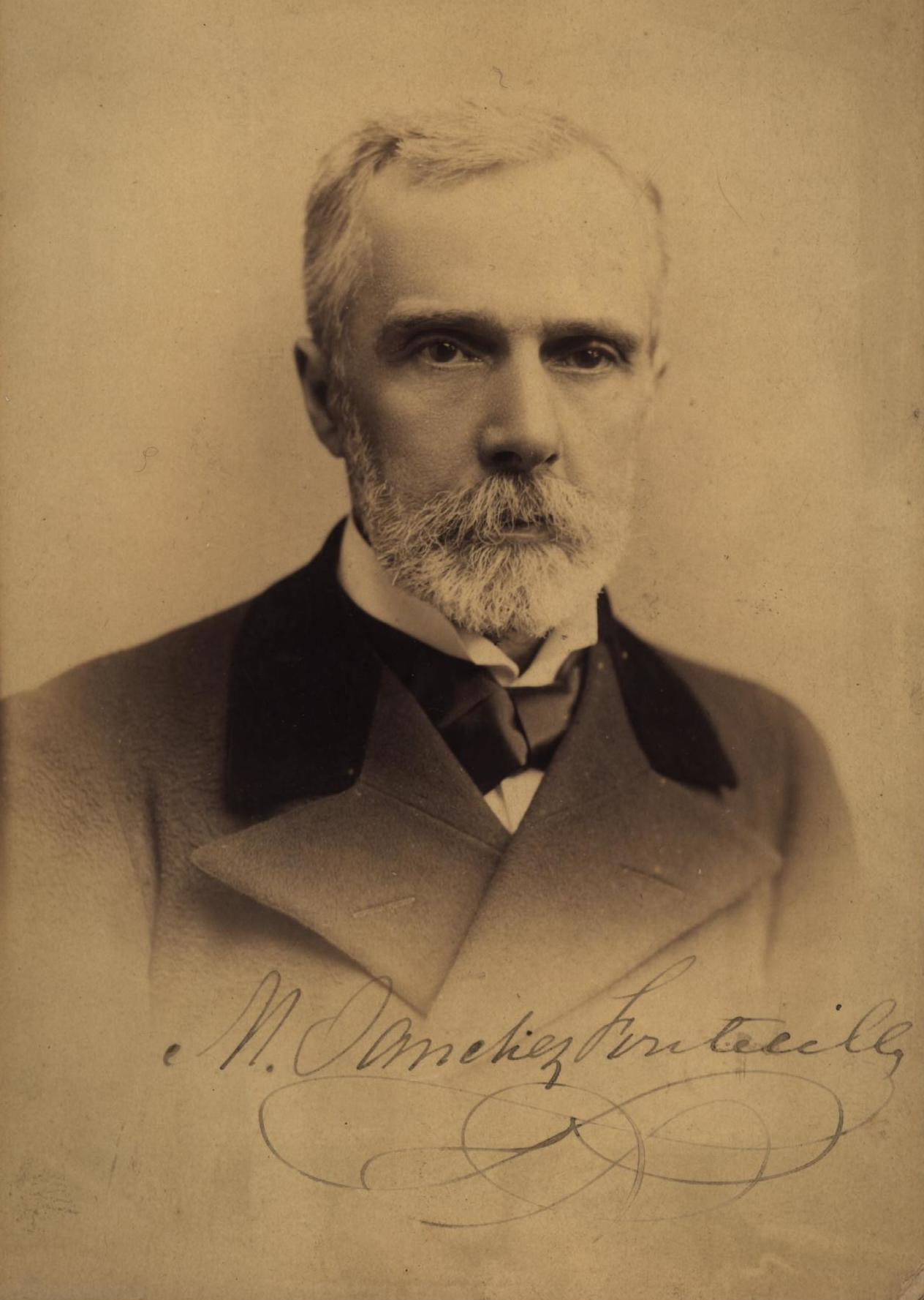 Mariano Sanchez Fontecilla (Chile)